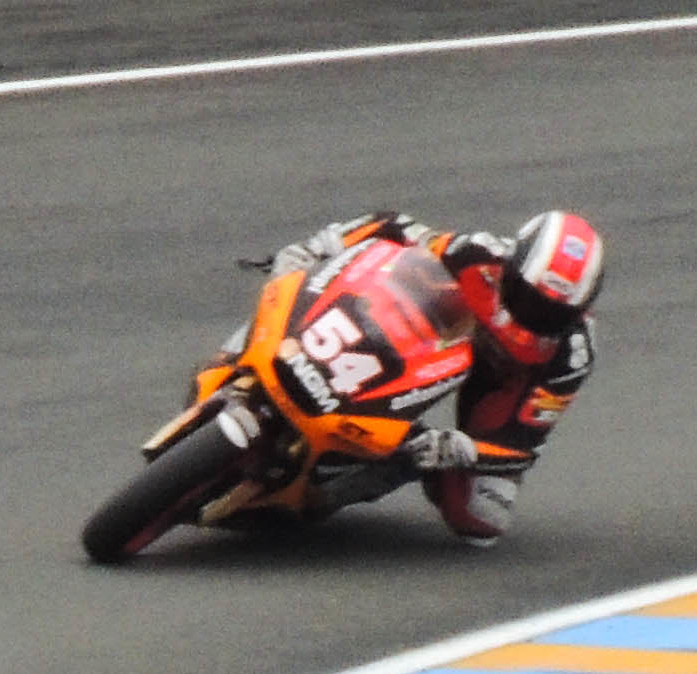 Scott Redding (45) mène la course Moto 2 devant Johann Zarco (5), Xavier Siméon (19), Dominique Aegerter (77), Mika Kallio (36), Mattia Pasini (54) et Mike Di Meglio (63).